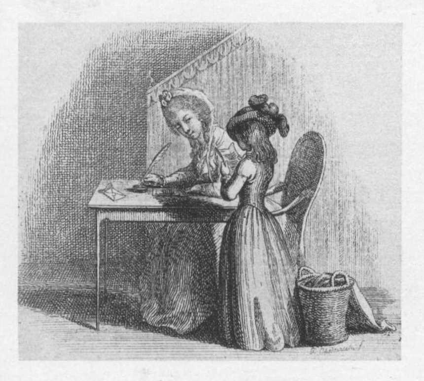 Titelvignette zu Christian Felix Weißes Briefwechsel der Familie des Kinderfreundes (Beschreibung lt. Quelle)